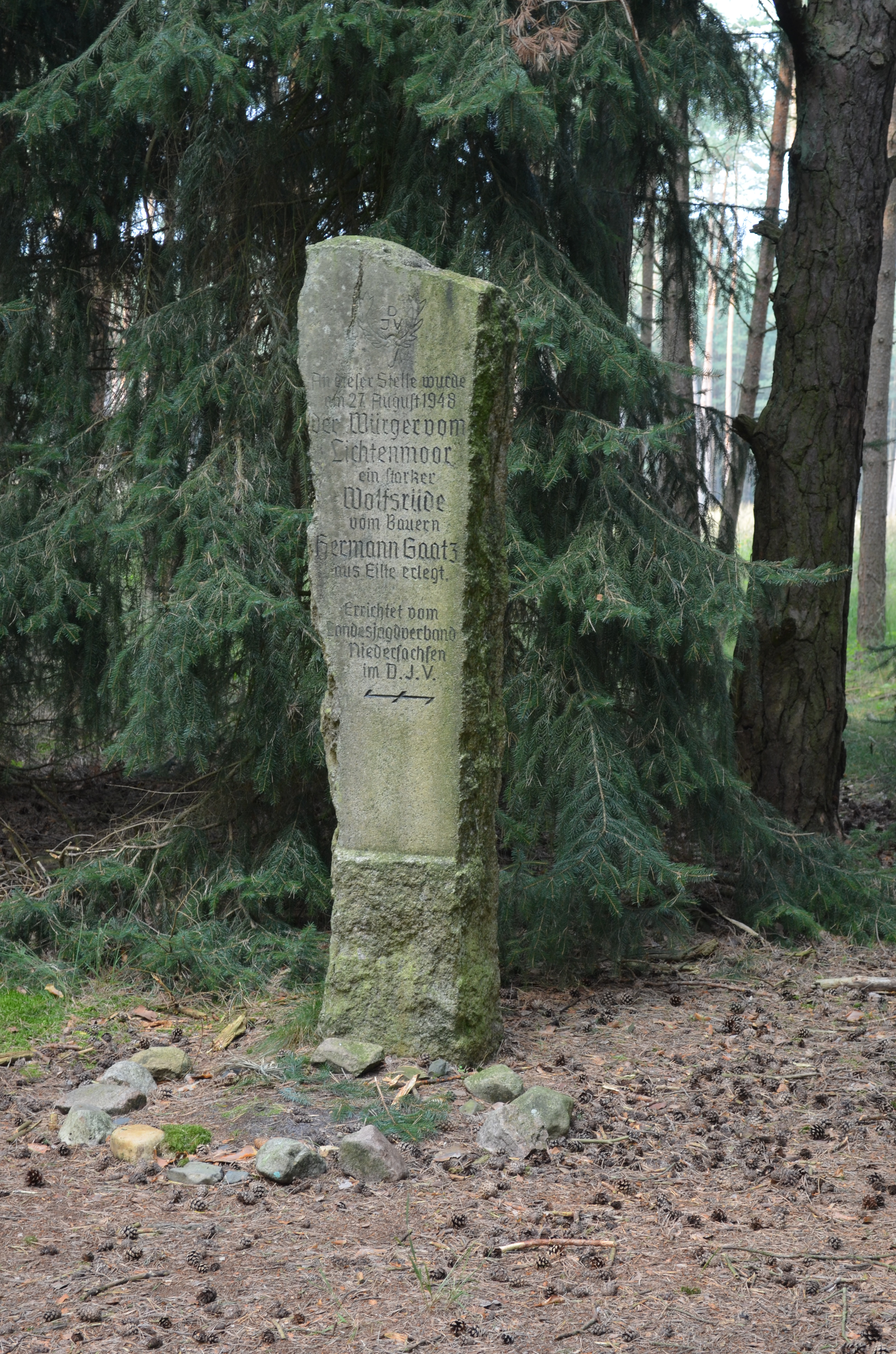 Der Wolfstein in der Schotenheide bei Ahlden (Aller)